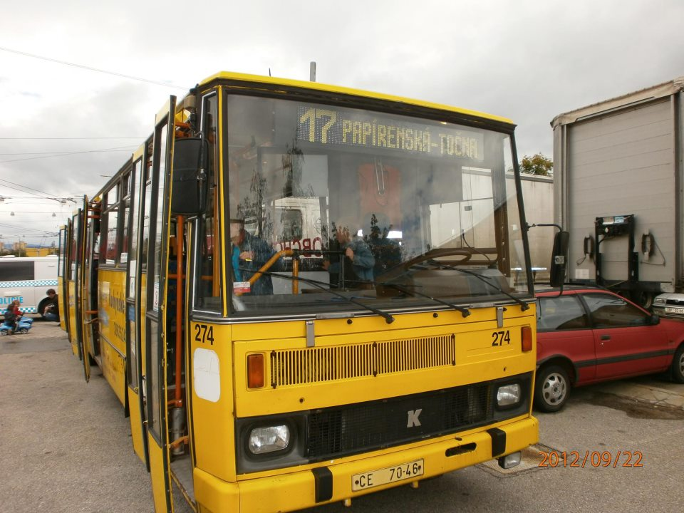 vozovna Horní tr.